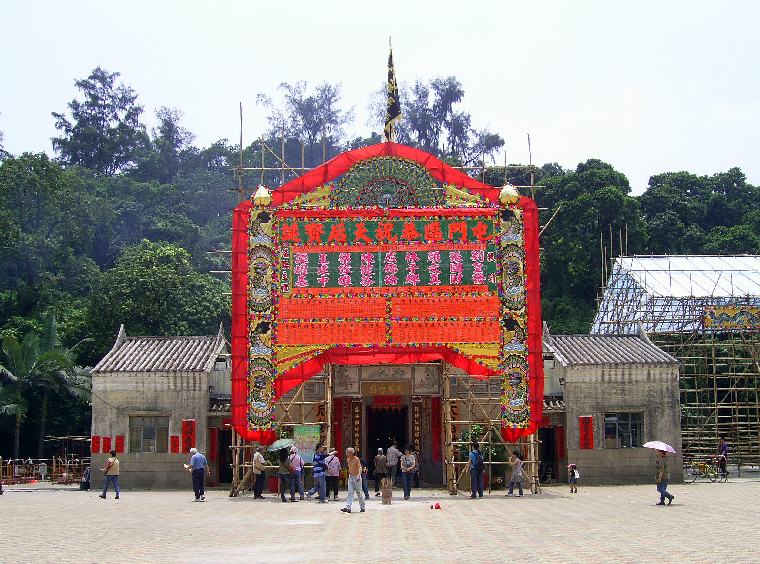 中文（香港）: 后角天后廟